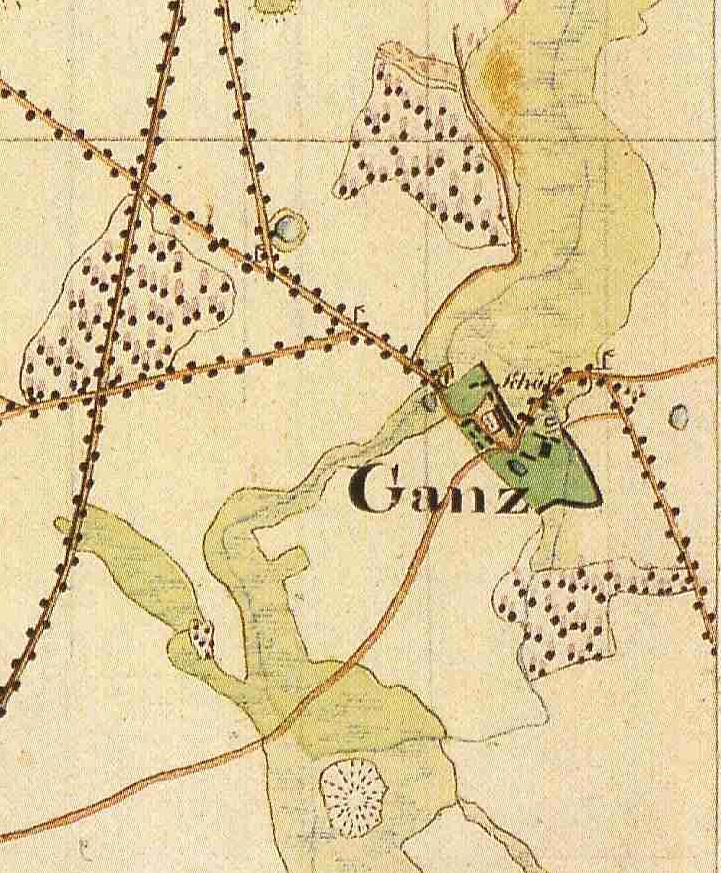 Ganz, Wohnplatz der Stadt Kyritz, Lkr. Ostprignitz-Ruppin, Brandenburg, Ausschnitt aus dem Urmesstischblatt 2940 Blumenthal von 1825